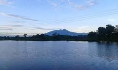 Suasana Situ Tonjong